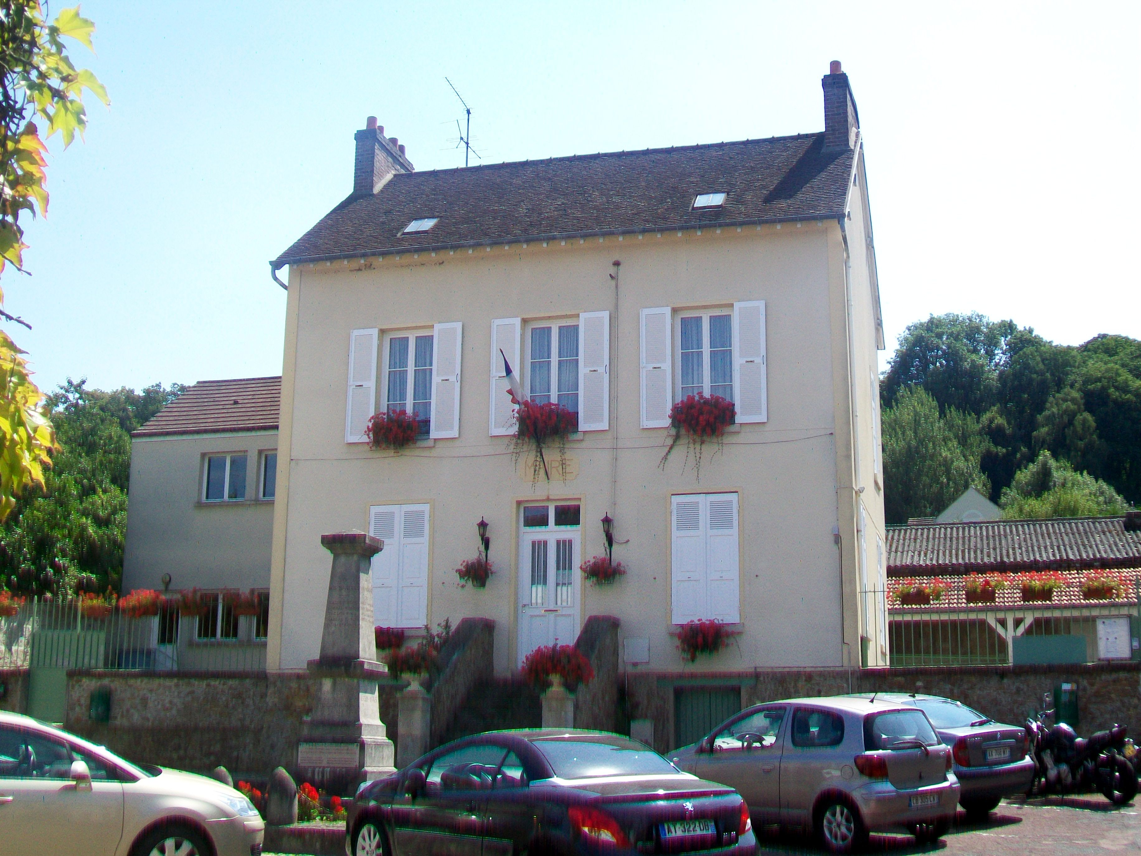 La mairie, rue Saint-Claude.